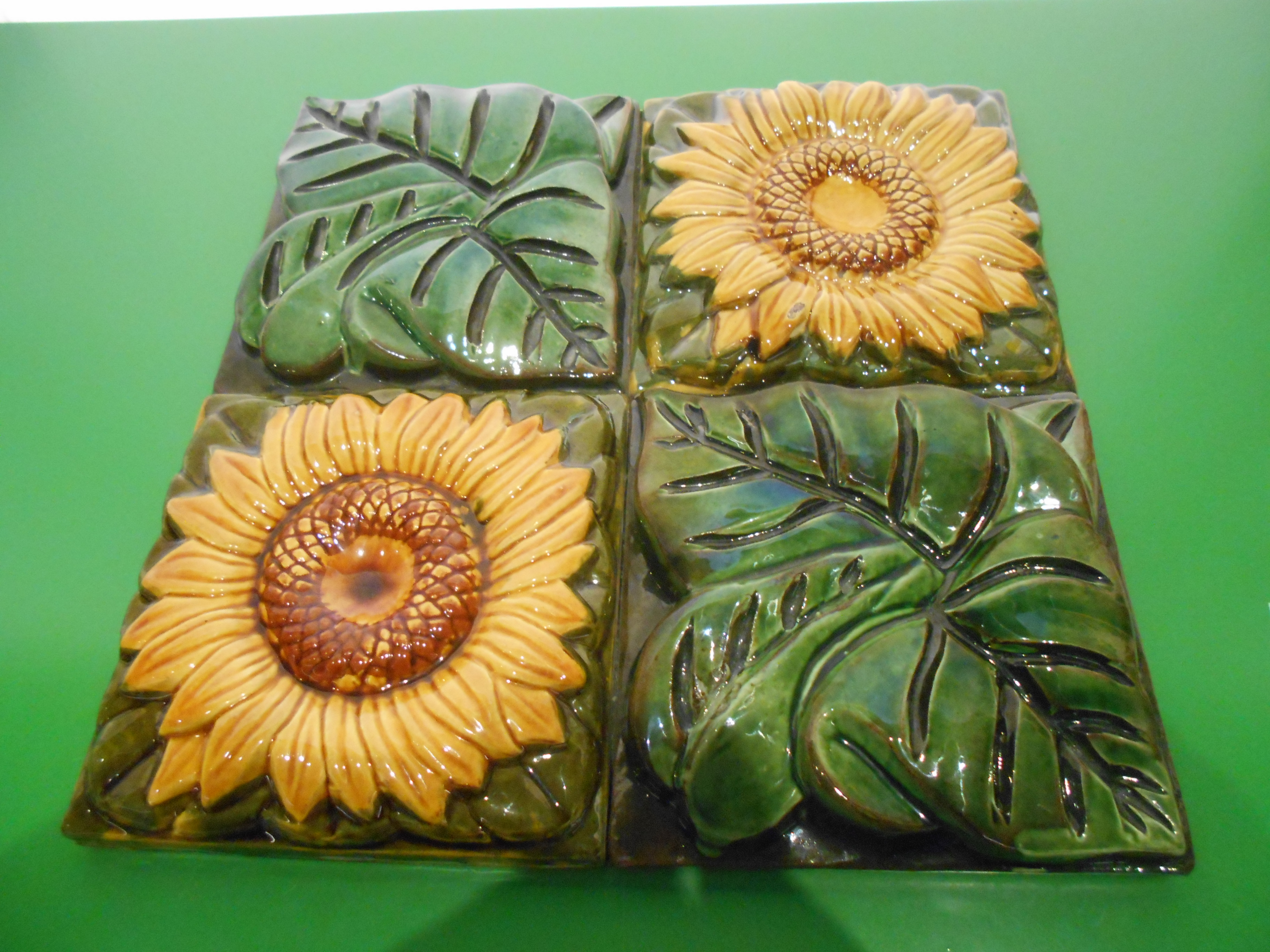 Azulejo en forma de flor y hoja de girasol, diseñado por Gaudí para la casa Vicens de Barcelona y El Capricho de Comillas.